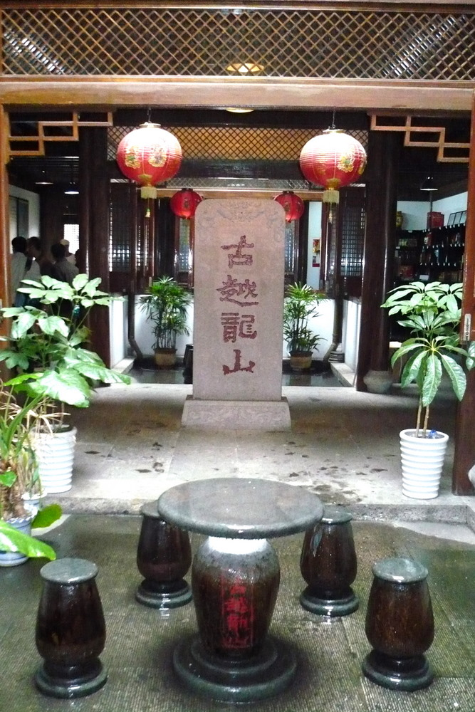 绍兴古越龙山